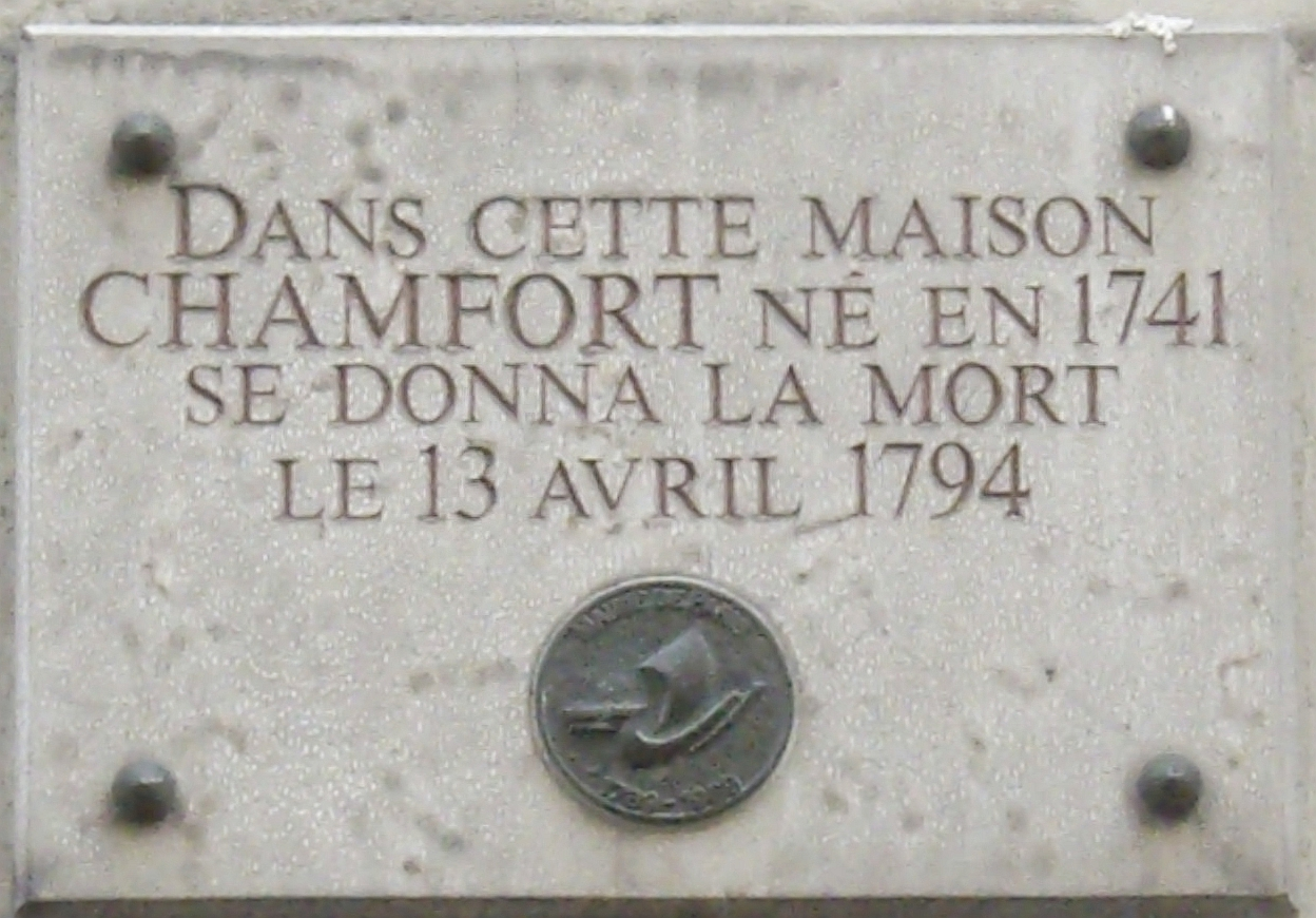 Plaque apposée au n° 10 de rue Chabanais, Paris 2e. « Dans cette maison, Chamfort, né en 1741, se donna la mort le 13 avril 1794. »